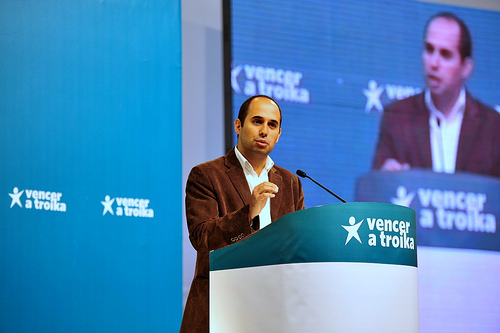 Pedro Filipe Soares na VIII Convenção do Bloco de Esquerda